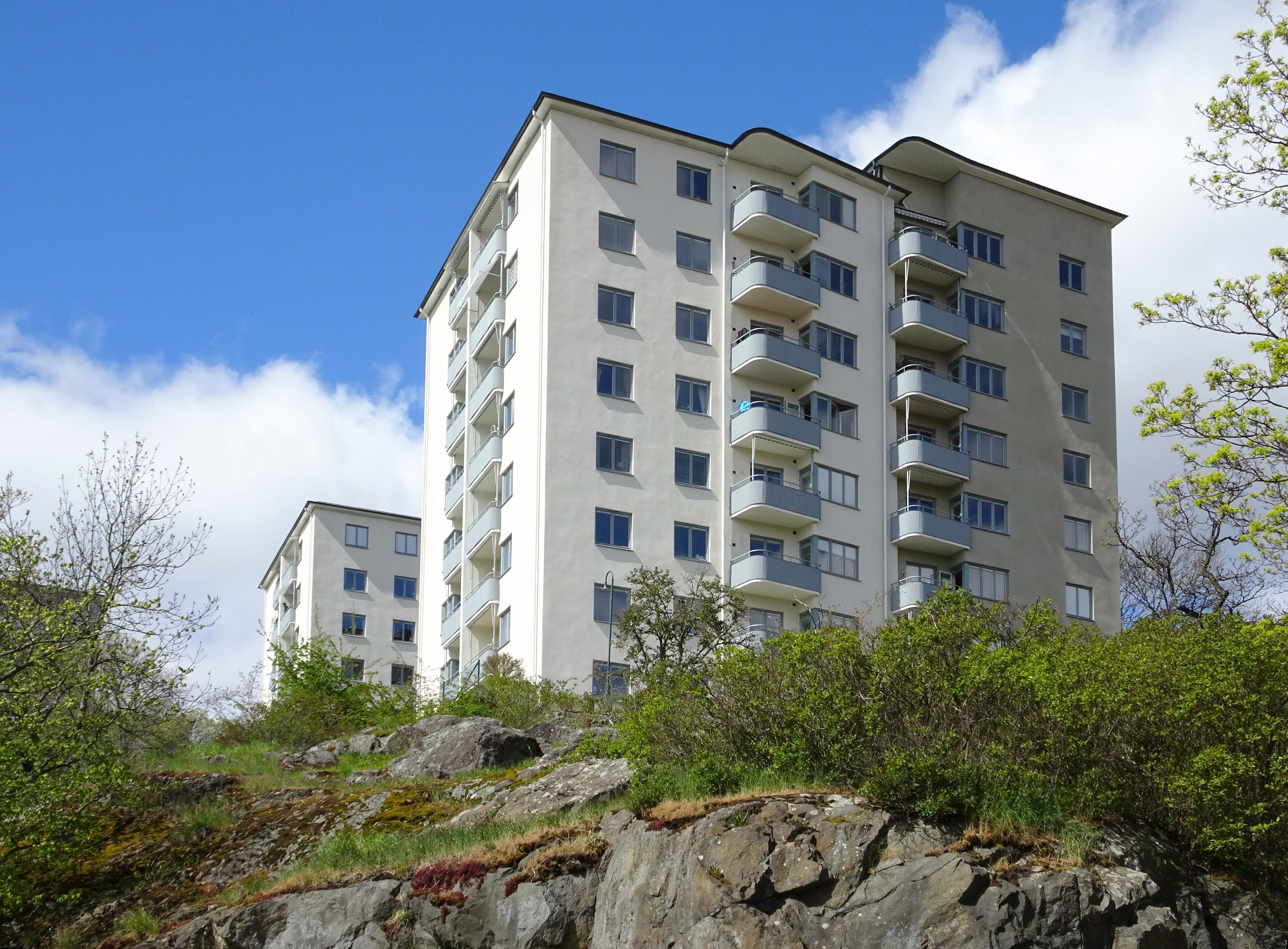 Pokalvägen 3 och 5, Reimersholme, fyra punkthus ritade av Sven Wallander för HSB 1943 - 1944